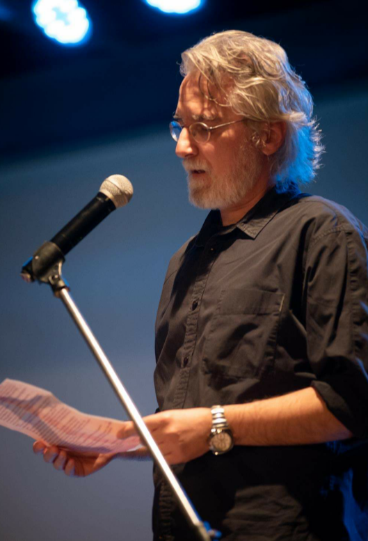 Φωτογραφία